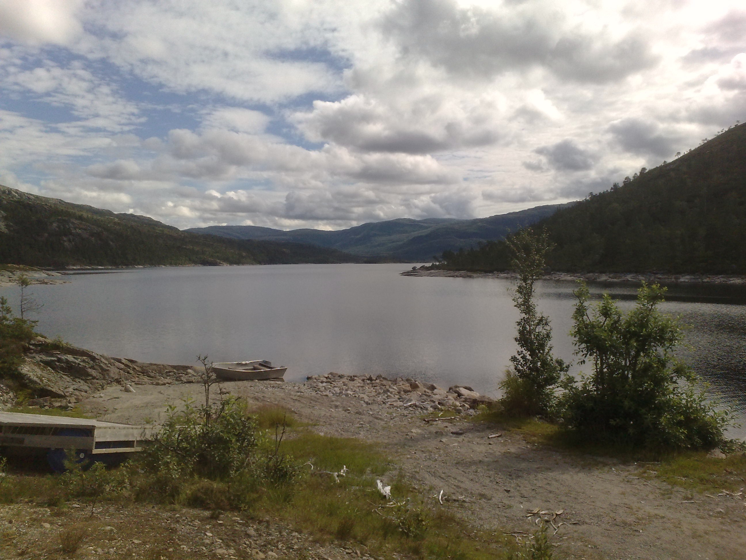 Bilde av Mjøsund. Tatt mot øst.